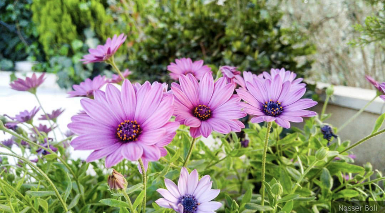 انها ورود ذات اللون البنفسجي الساحر ، لها رائحة جميلة ، تستخدم للزينة .